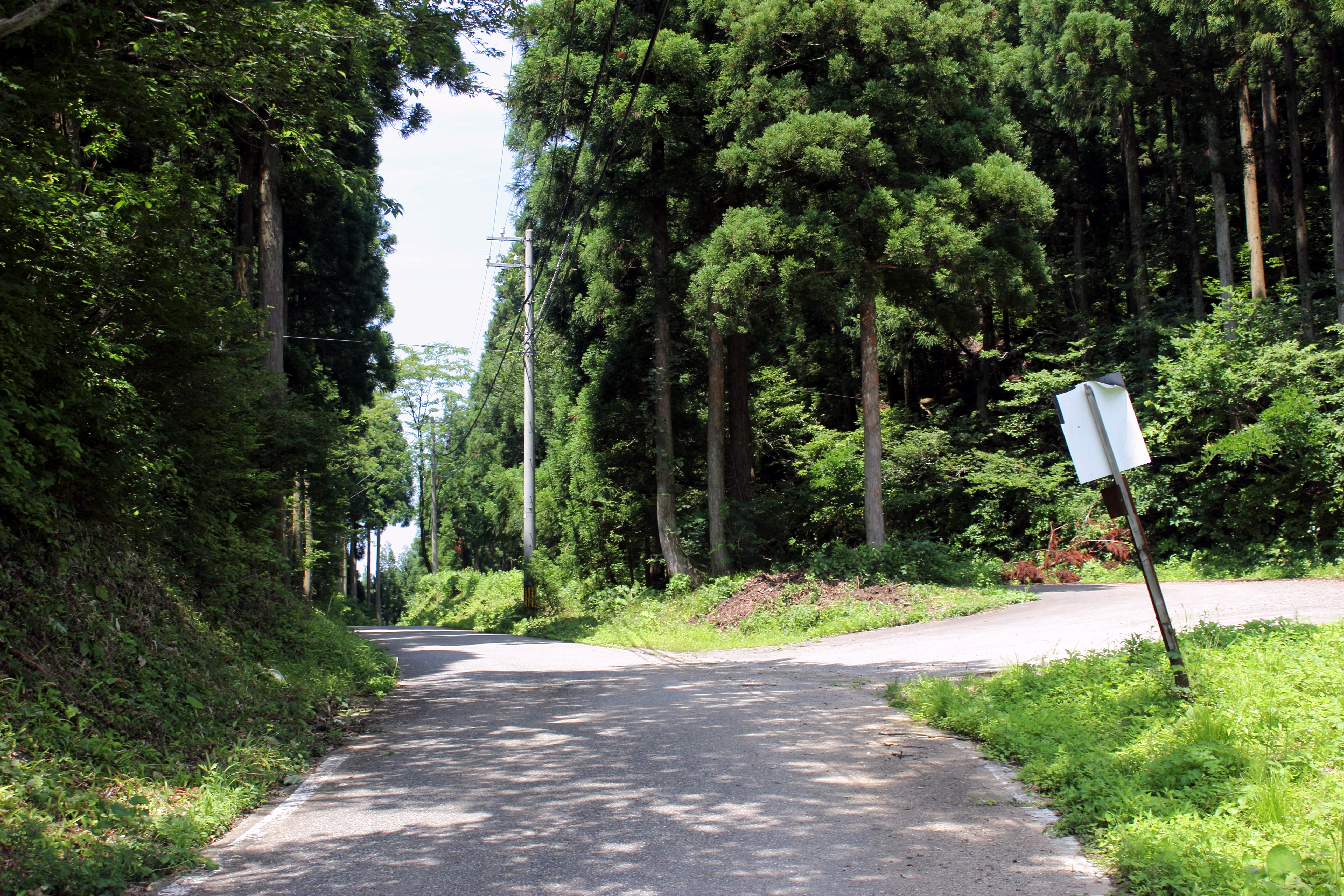 五百峠（石川県小松市）